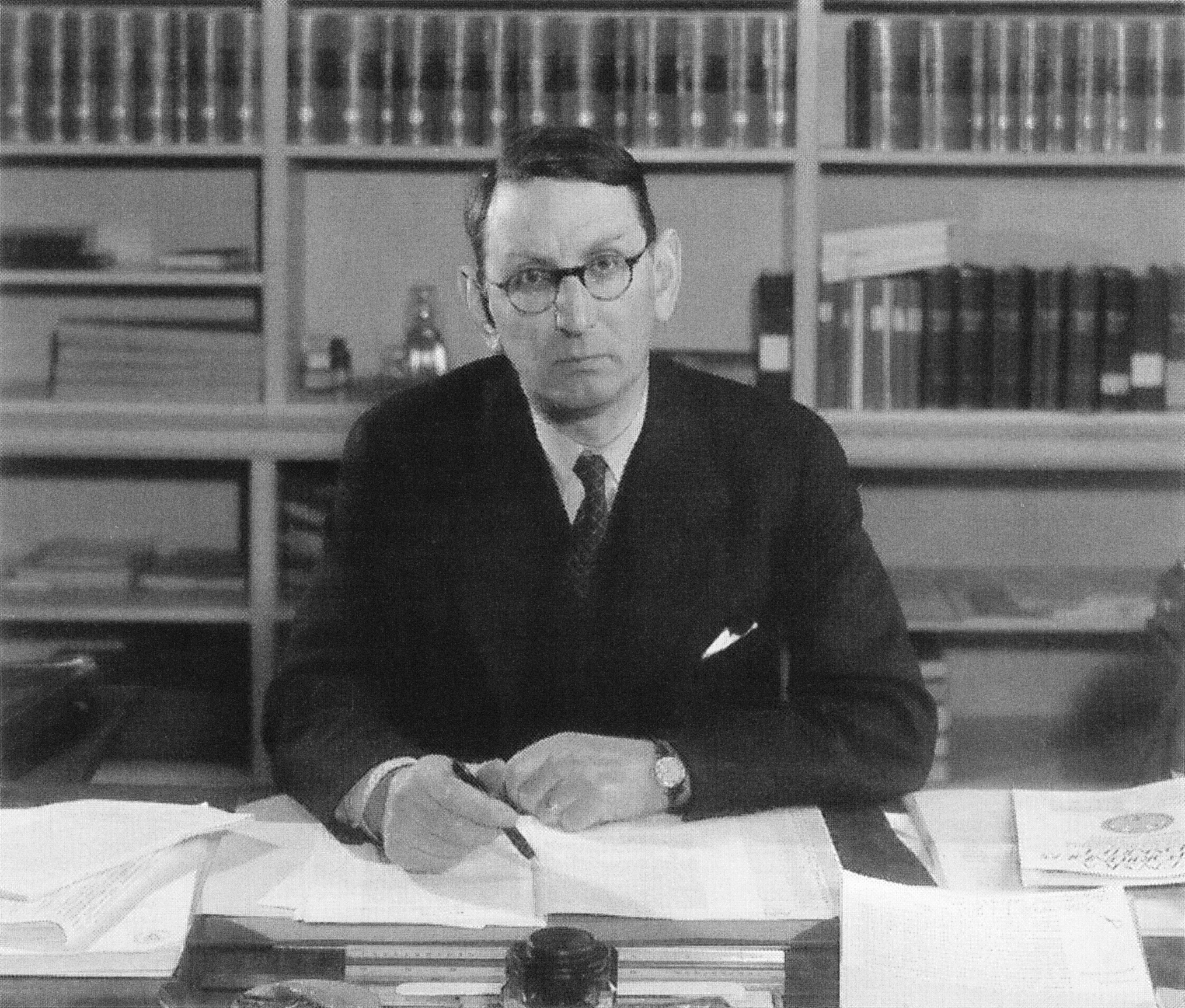 Yngve Larsson på sitt tjänsterum i Stockholms stadshus